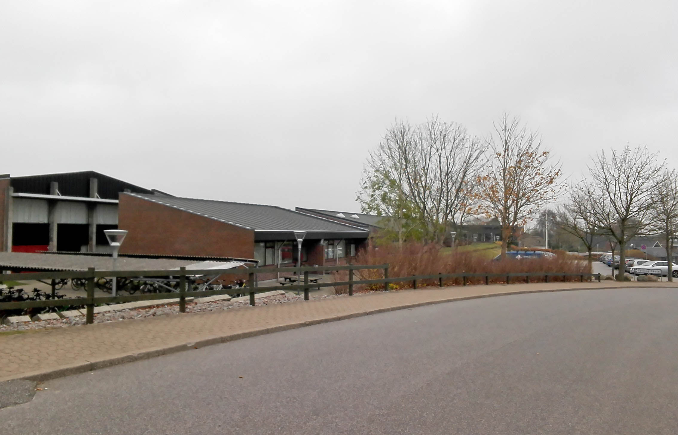 Tørring Skole